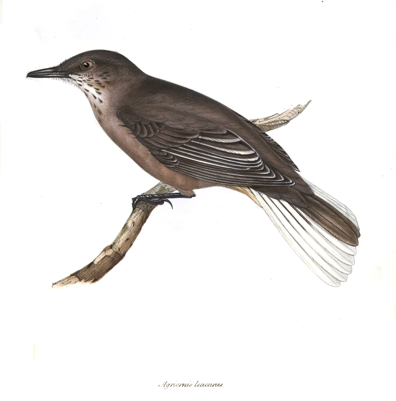 Agriornis leucurus (= Agriornis montanus leucura)